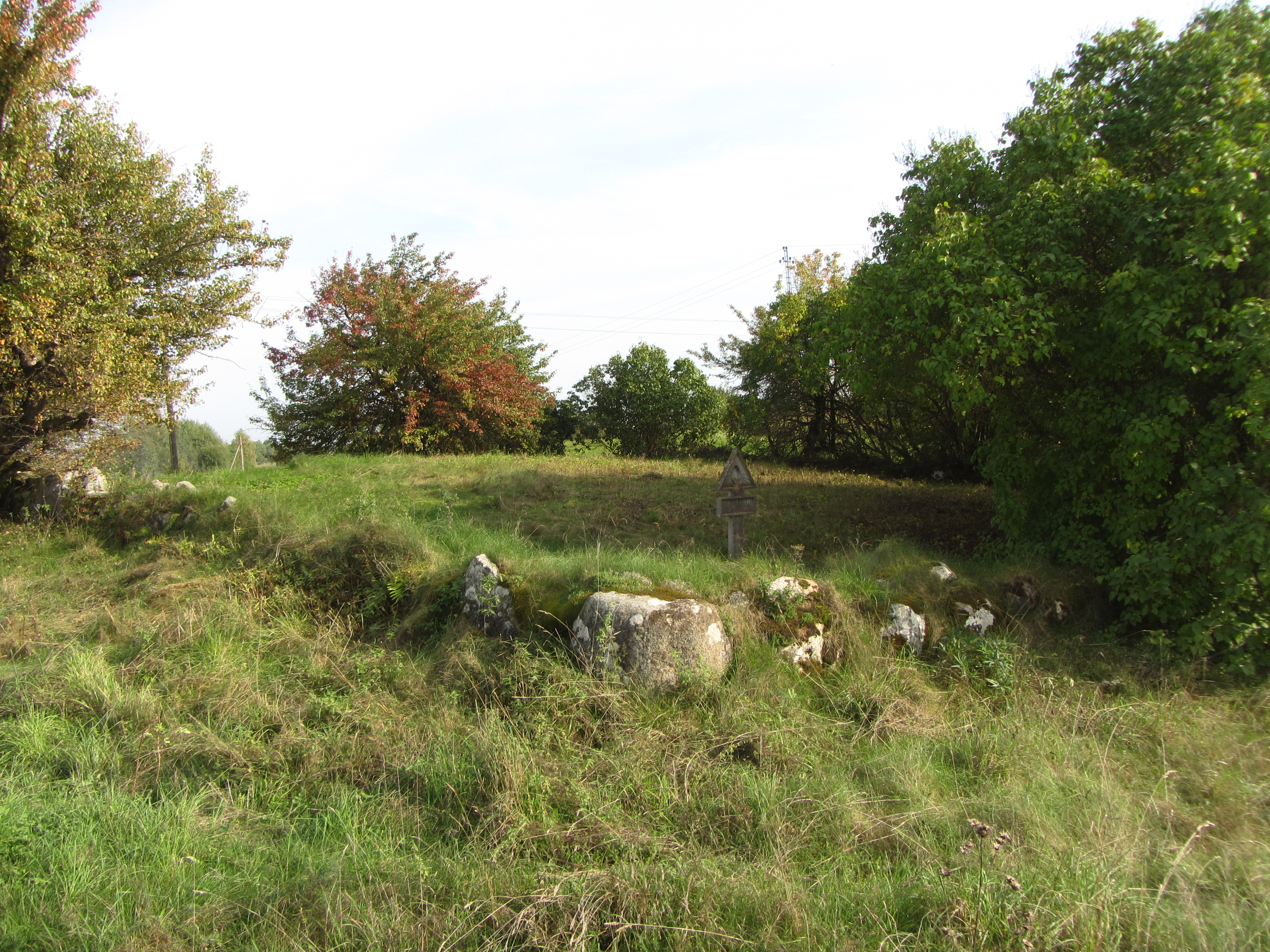 Purvėnai 33351, Lithuania